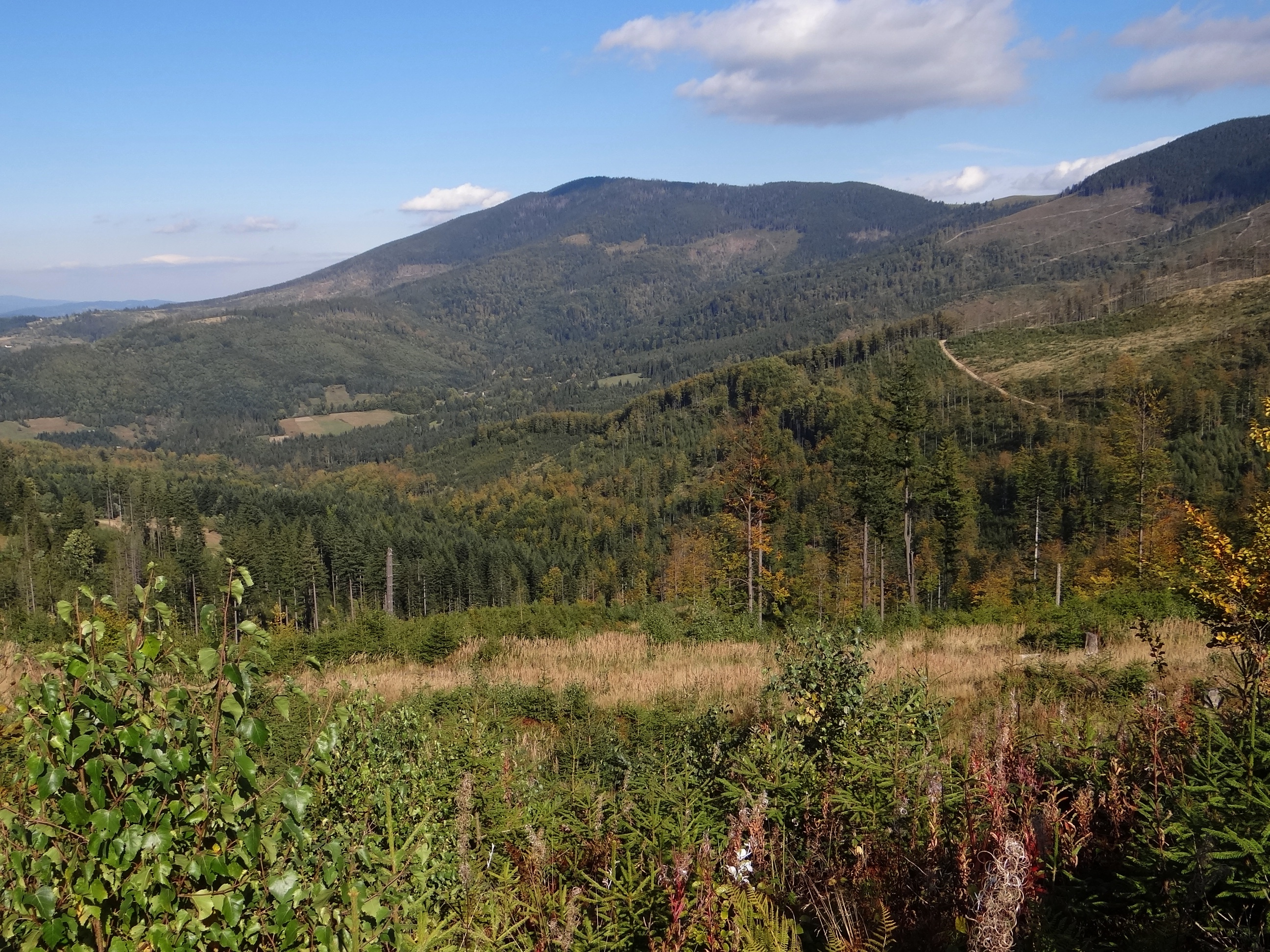 Widok na Romankę z okolic Hali Boraczej